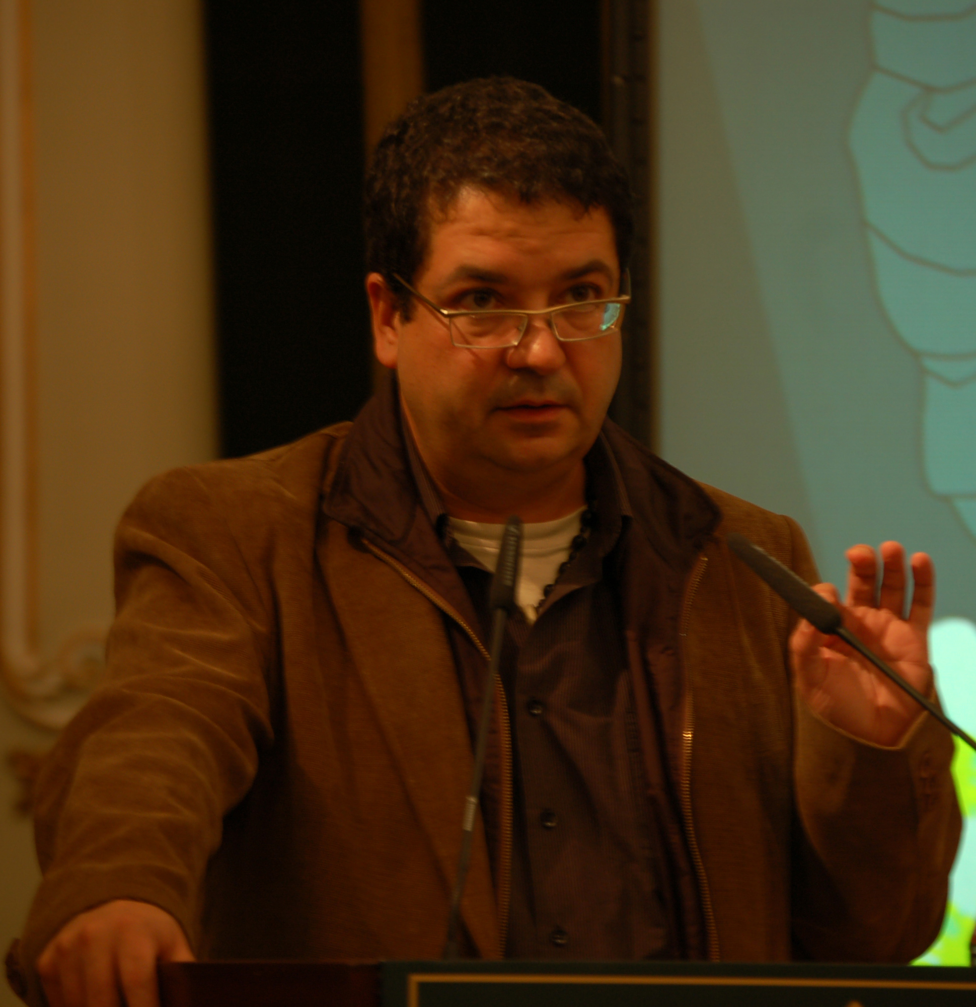 David Castillo i Buïls recitando Castillo i Buils, David